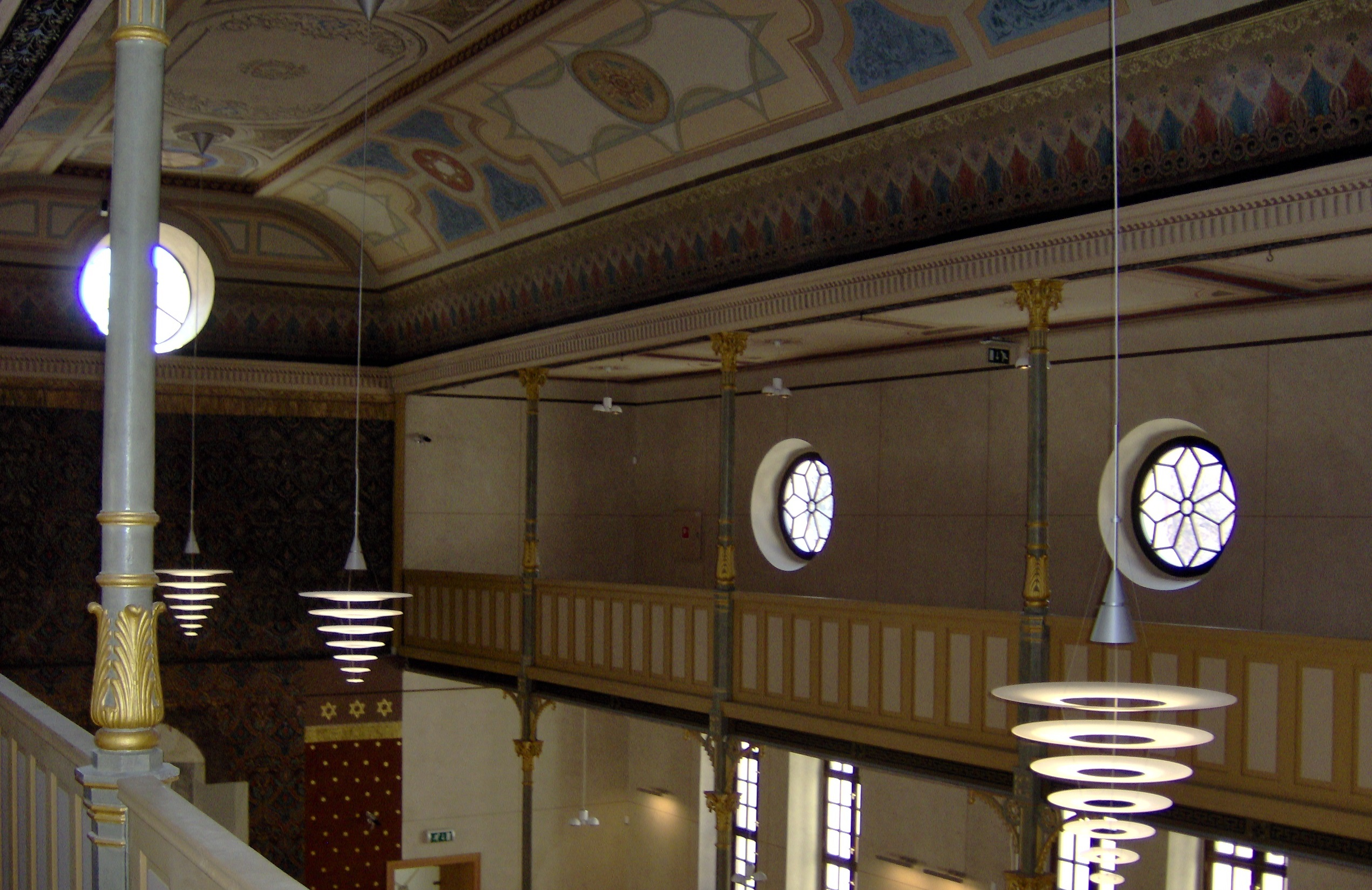 Lévai zsinagóga felújítás után